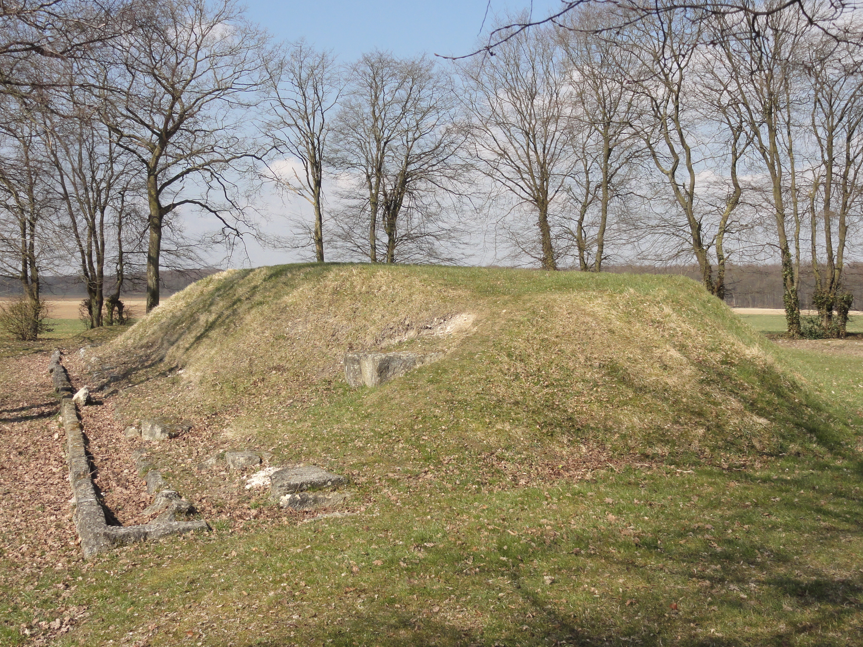 Vue depuis l'est.